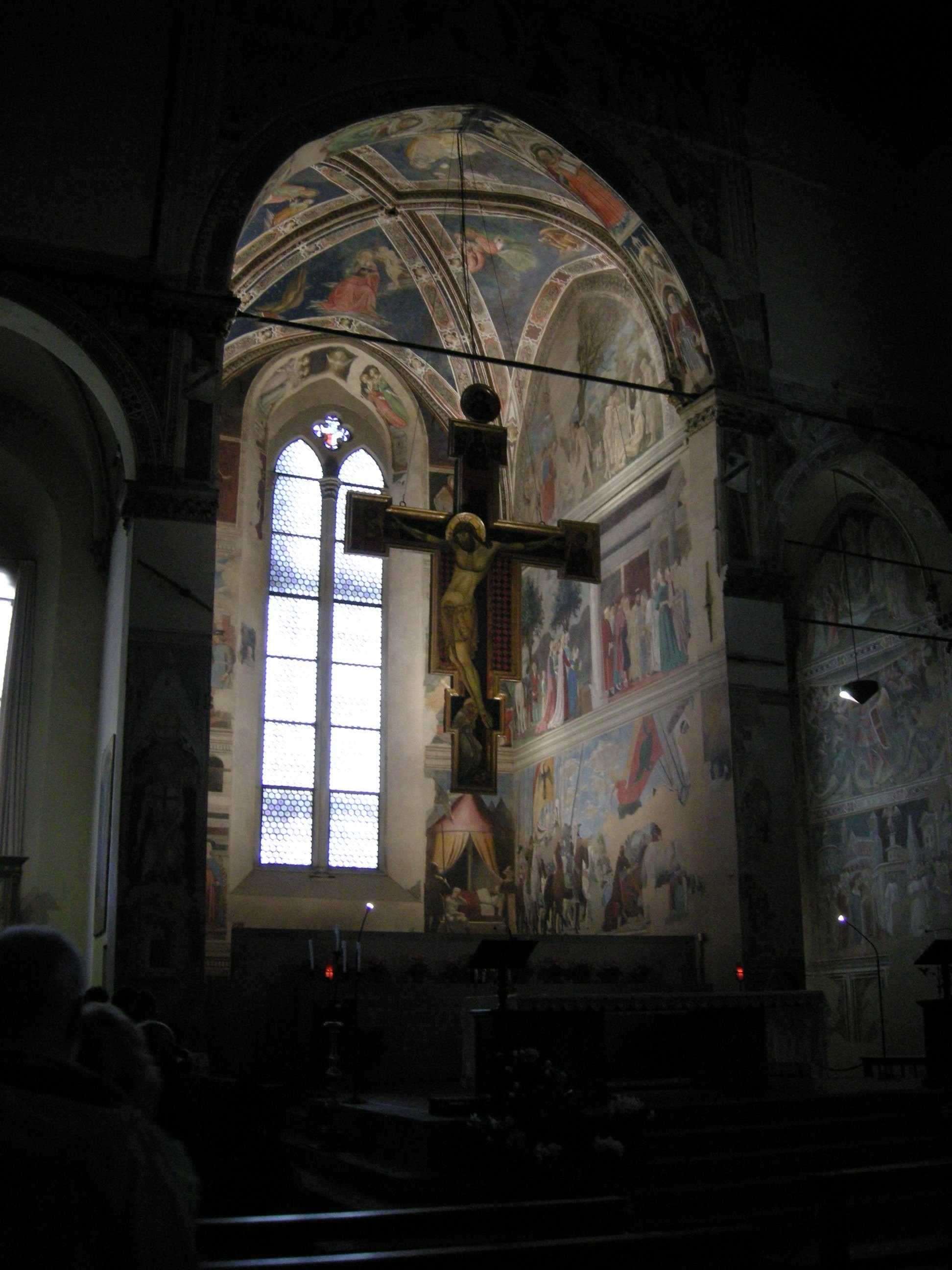 Cappella Bacci, San Francesco, Arezzo Native nameBasilica di San FrancescoLocationPiazza San Francesco, , ArezzoCoordinates43° 27′ 52″ N, 11° 52′ 51″ E Web page Authority control : Q1677980 VIAF: 144244280 ISNI: 0000 0001 2111 147X LCCN: n80072494 NKC: kn20100526007 WorldCat institution QS:P195,Q1677980